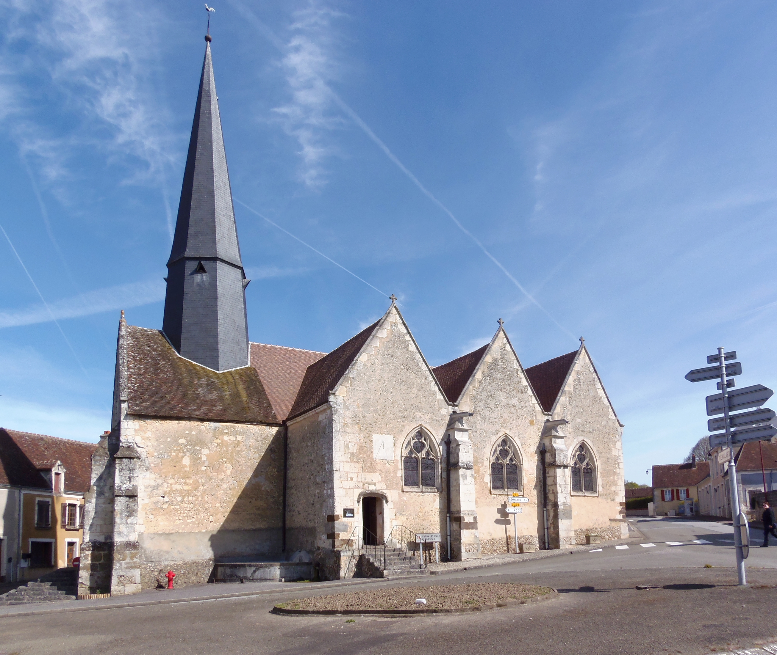 Verrières (Normandie, France). L'église Saint-Ouen.